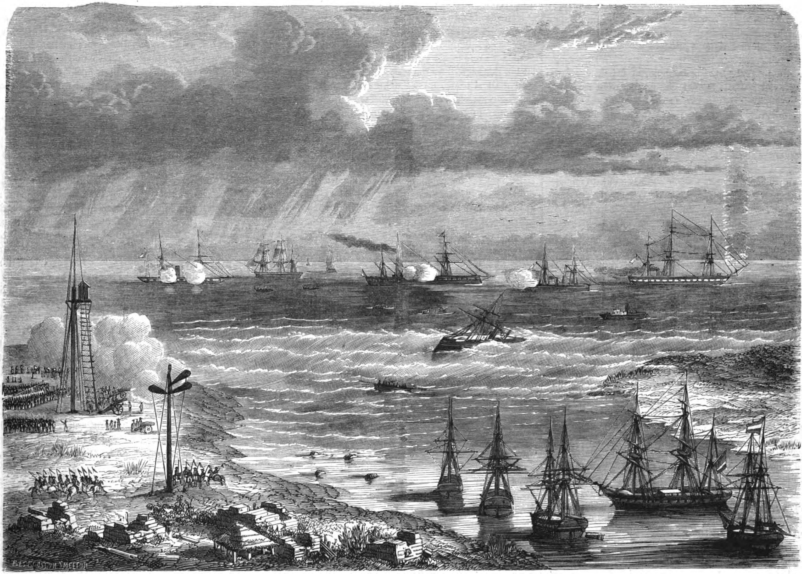 Expédition du Mexique. — Le navire "La Lance" sous le feu de l'artillerie mexicaine dans le port de Tampico. — D'après un croquis de M. A. M. de O.